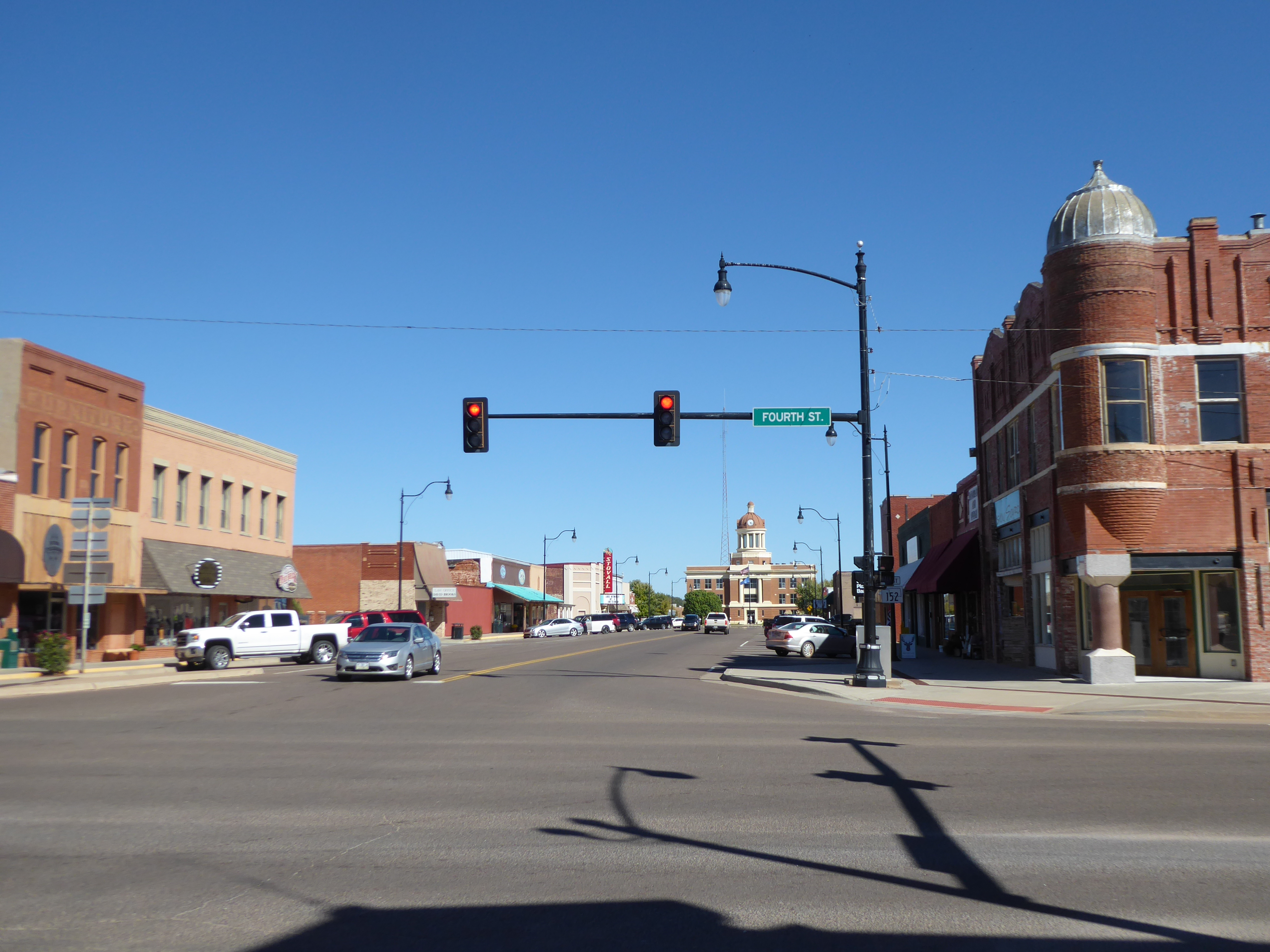 2016-10-05 @15-25-59 P1000868